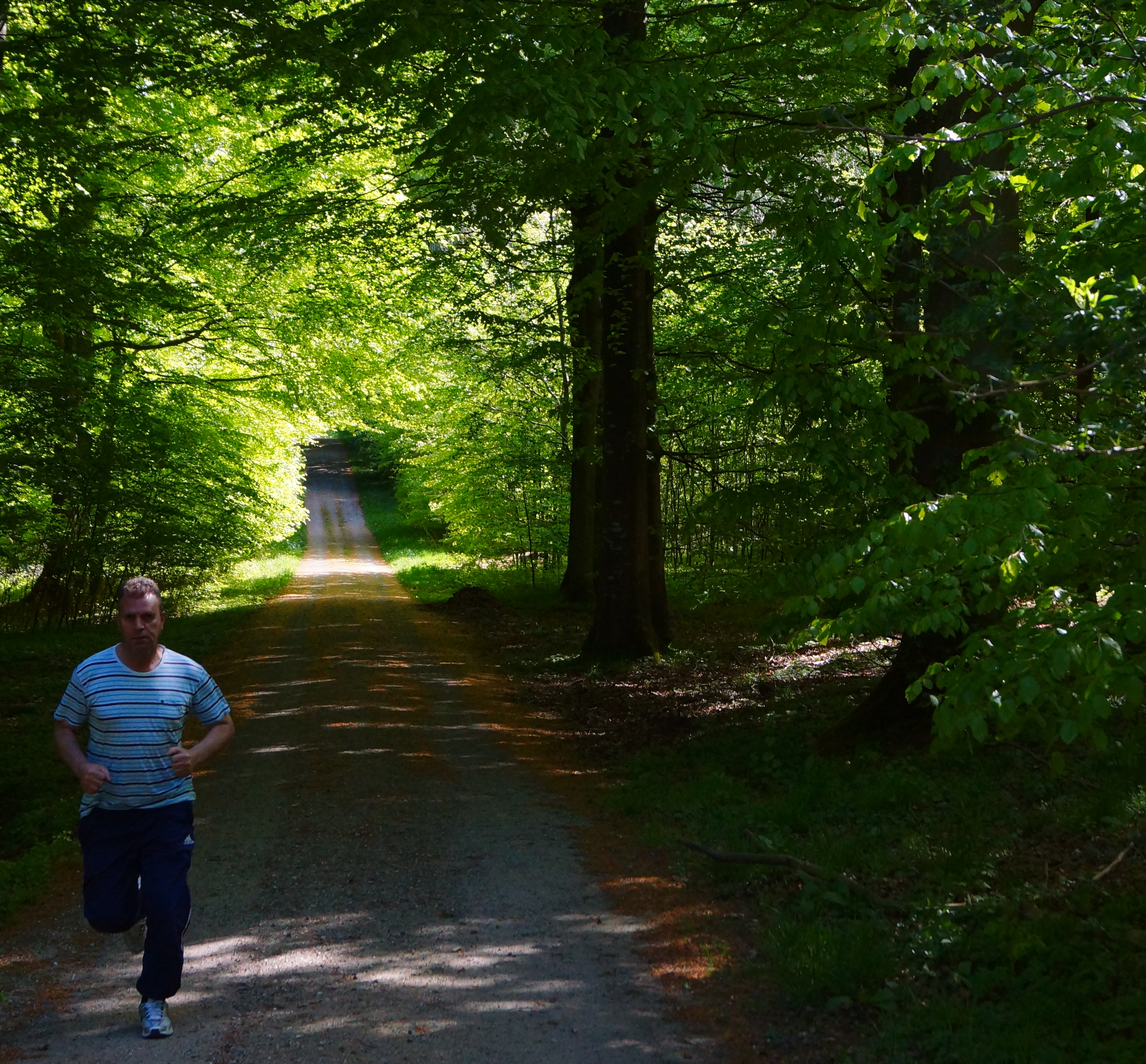 Thyras hytte, Hestehave Skov 3